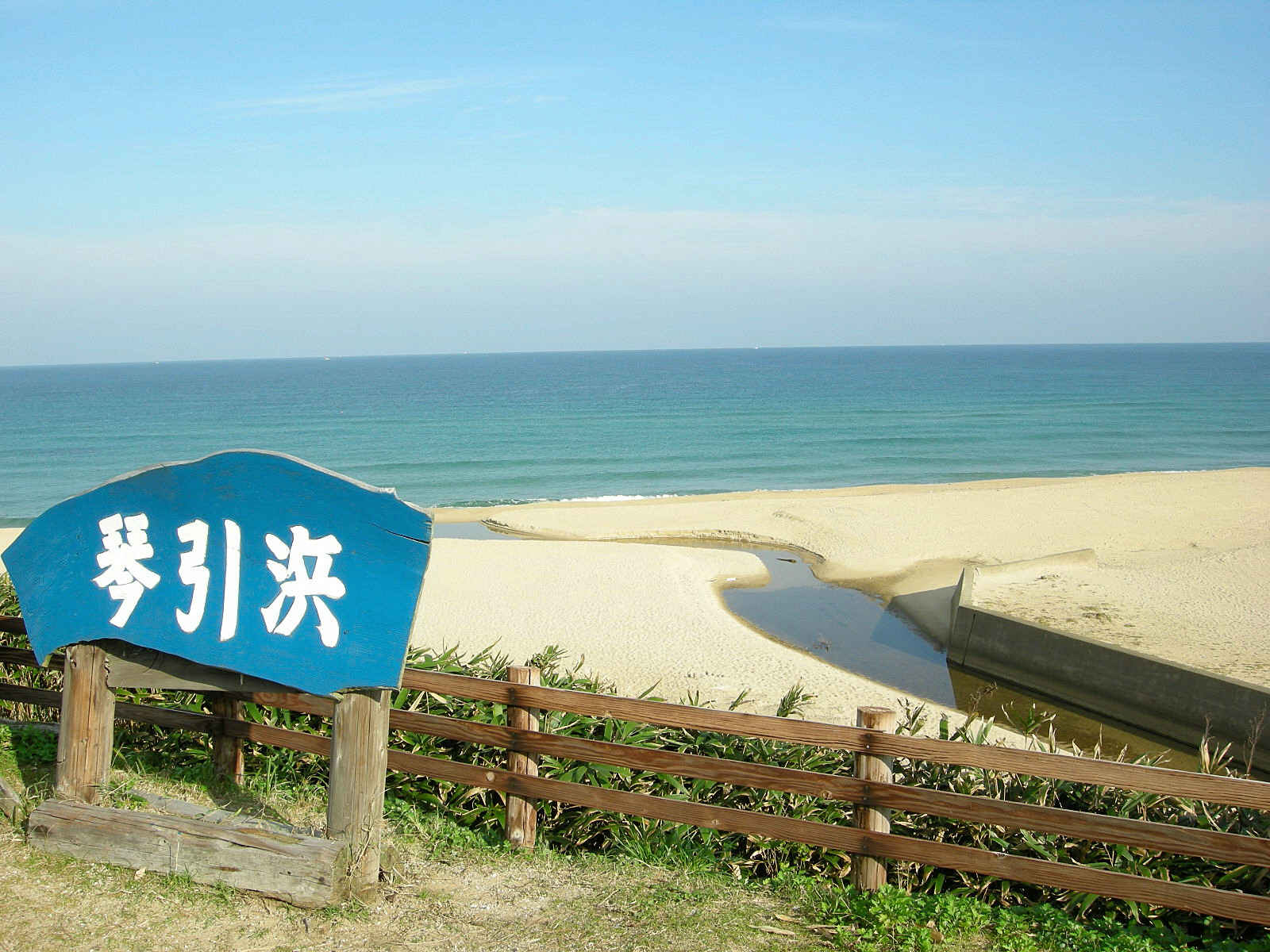 Kotobiki beach at Kyoto PREF